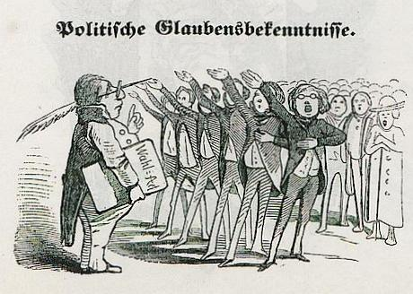 Münchner 'Leuchtkugeln', 1848. Wahlmann vor Abgeordnetenkandidaten. Der Legende nach versprechen sie alle das gleiche, eine konstitutionelle Monarchie.